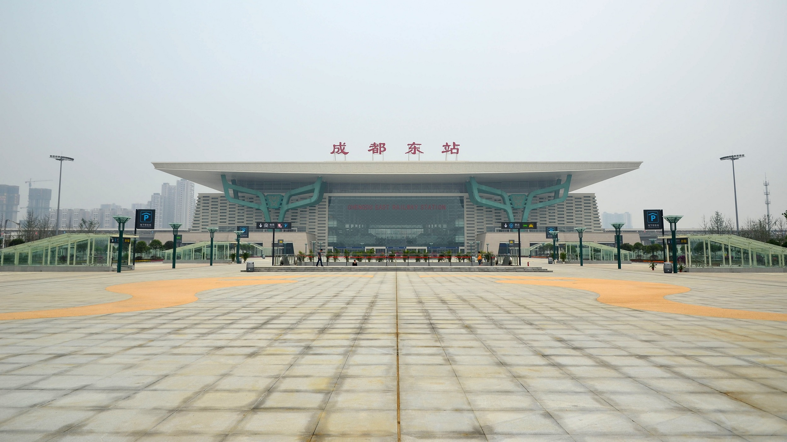 四川省成都东站